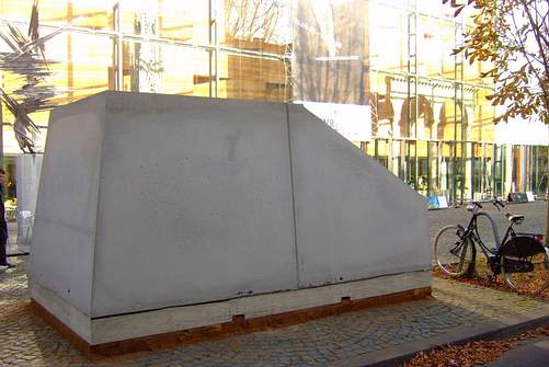 Cornel Wachter: Hommage "Ruhender Verkehr" (Wolf Vostell) – Standort: Bonn, Rheinisches Landesmuseum – Material: Beton/ Mercedes A-Klasse